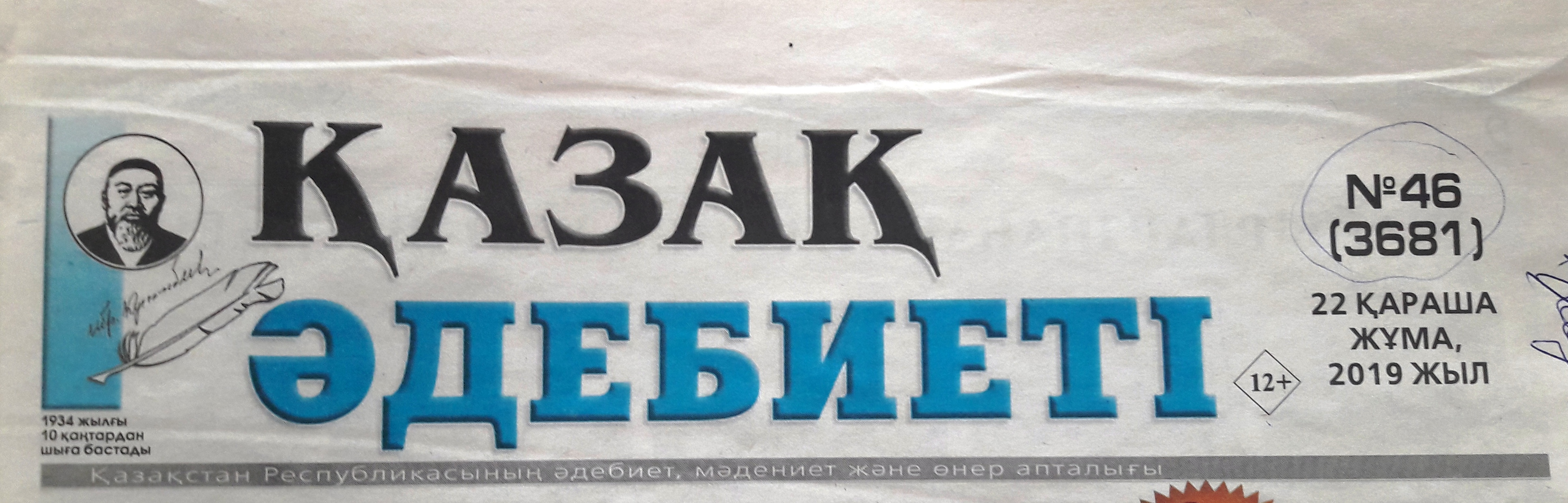 Қазақша (кирил): Газета